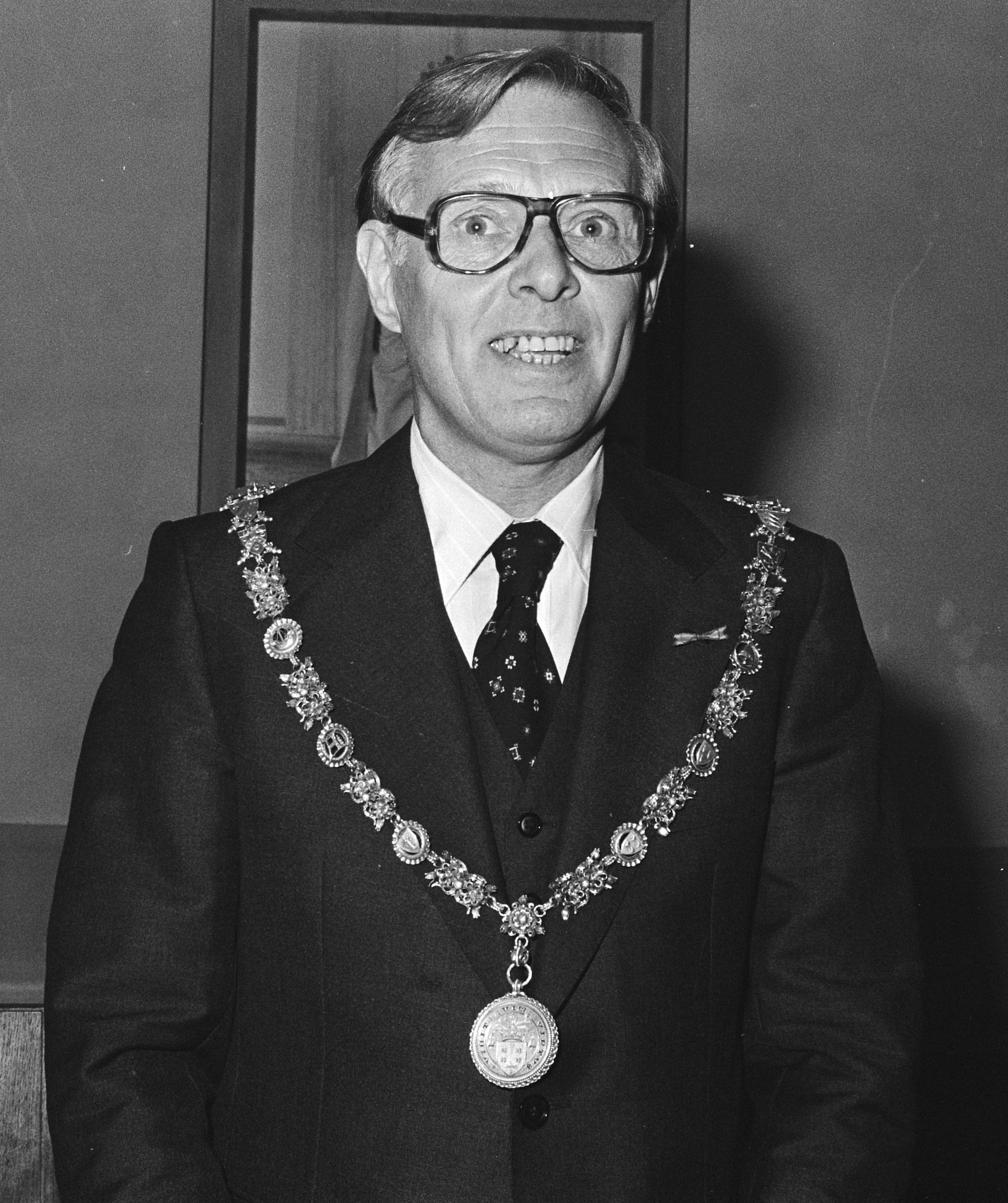 Installatie nieuwe burgemeester van Haarlem drs. J. Reehorst